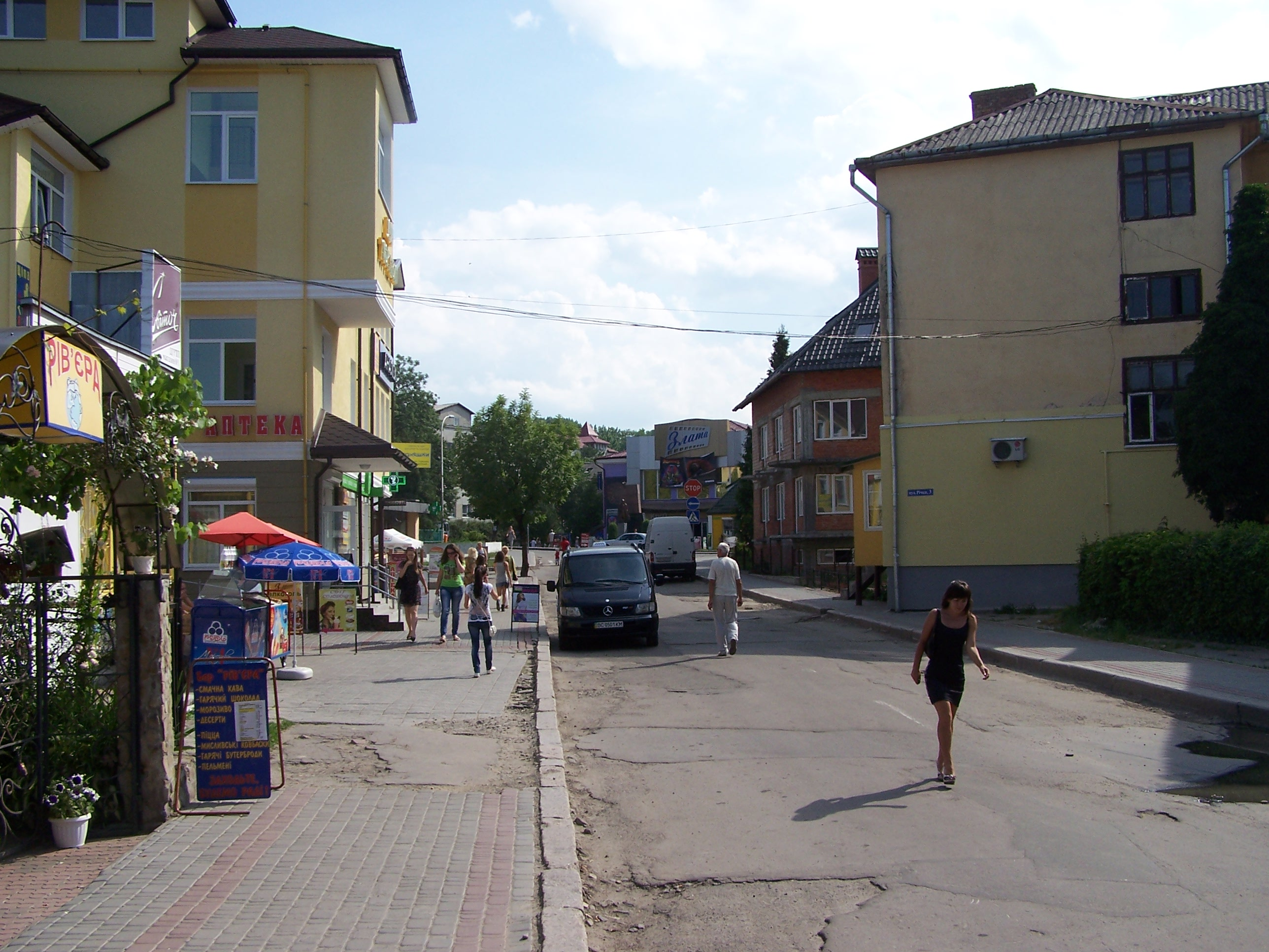 Truskavets, Lviv Oblast, Ukraine, 82200